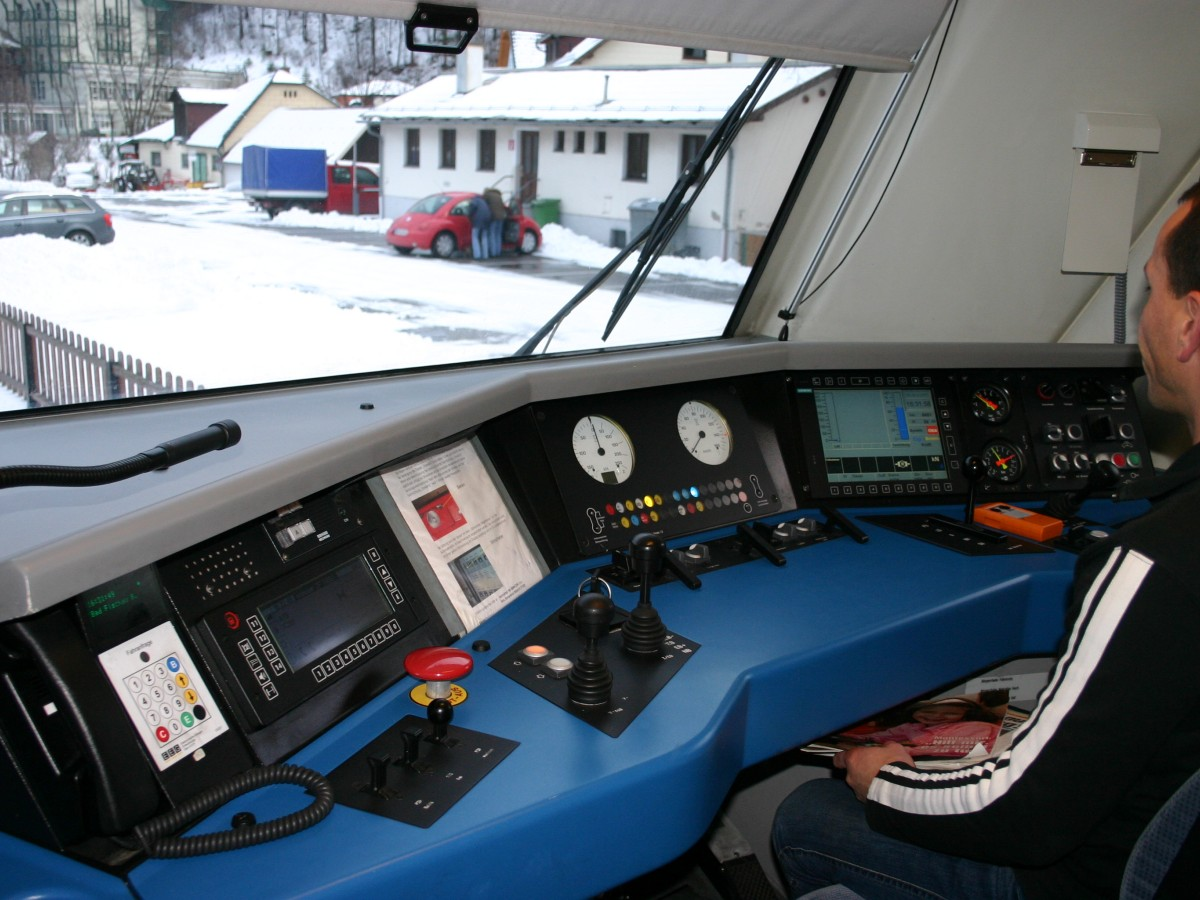 Führerstand einer ÖBB 2016 (Bild 1).jpg